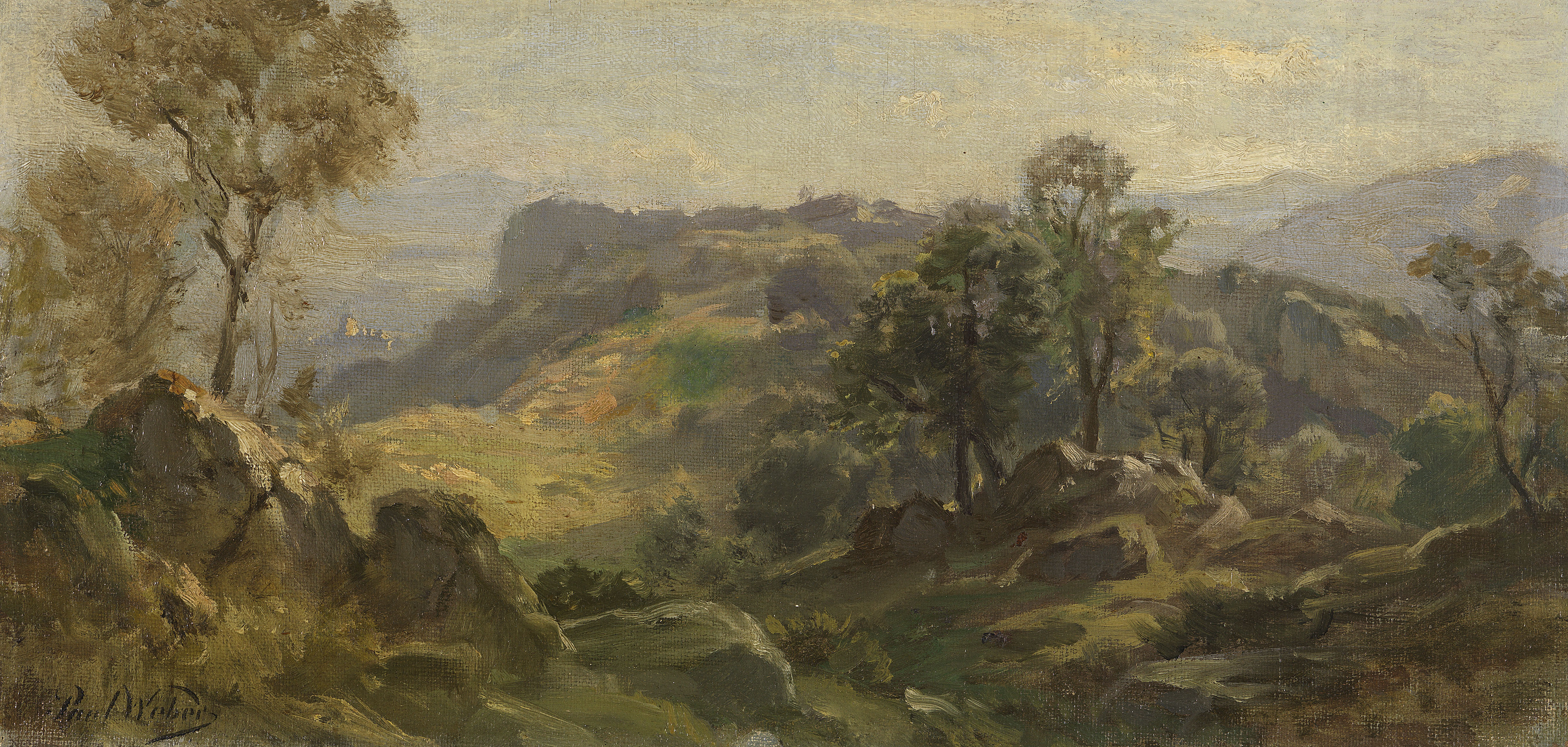 Serpentaralandschaft bei Olevano, 18,4 x 36,2 cm (7,2 x 14,2 in), Öl auf Leinwand, auf Malpappe aufgezogen